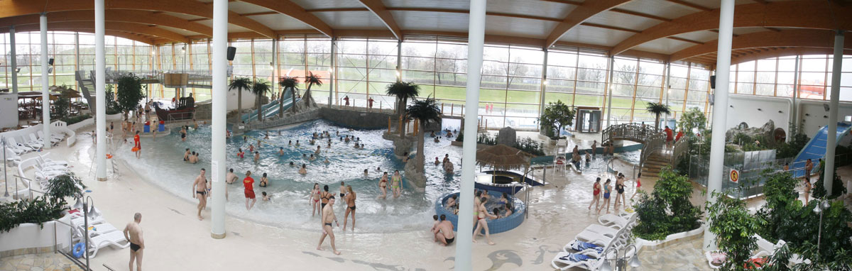 Wrocławski Park Wodny - Baseny Rekreacyjne